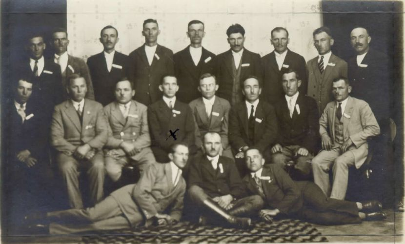 Dobrovoljci I. svetovne vojne iz Prekmurja